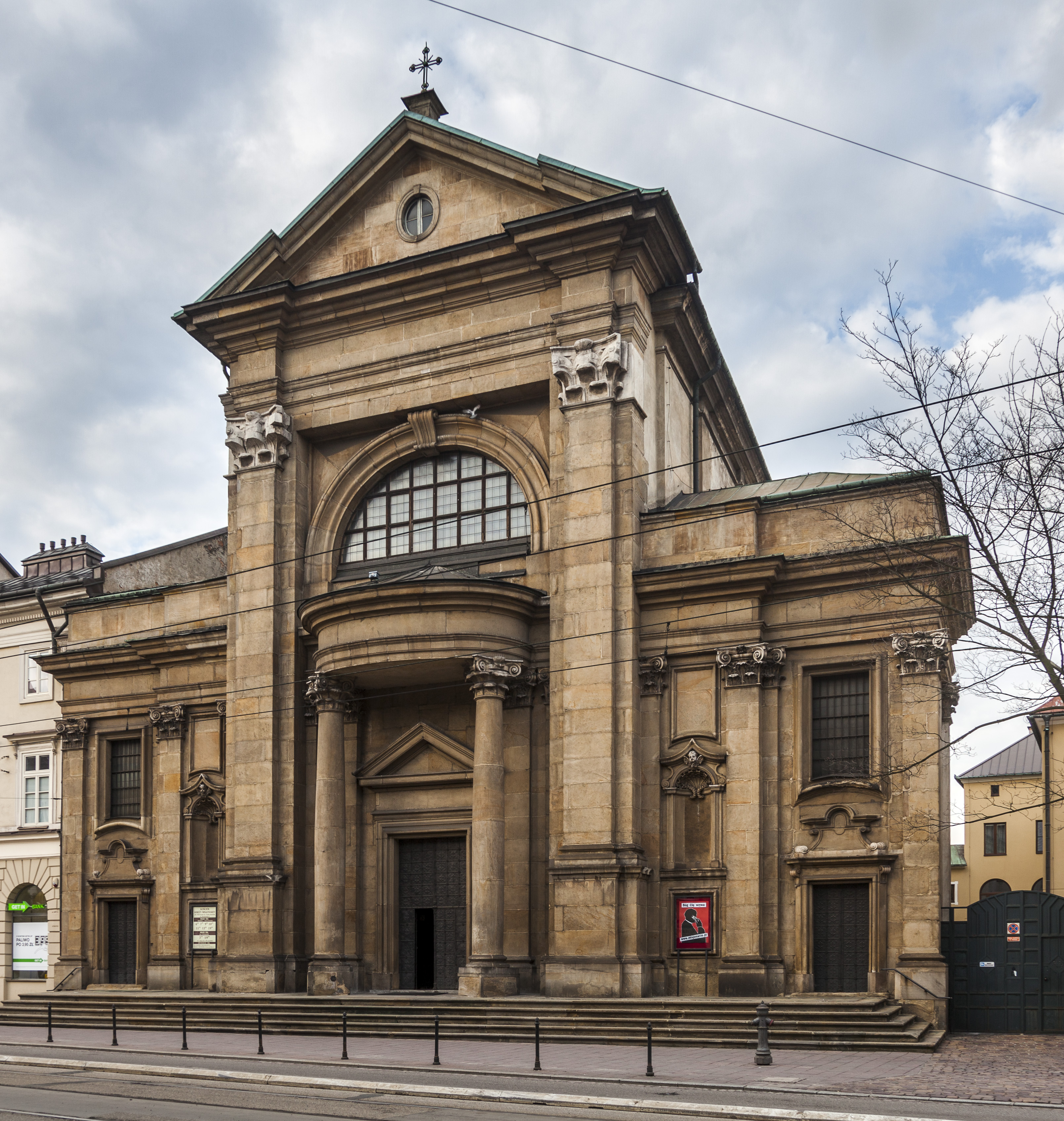 Kościół Nawrócenia św. Pawła w Krakowie, projektu Kacpra Bażanki.